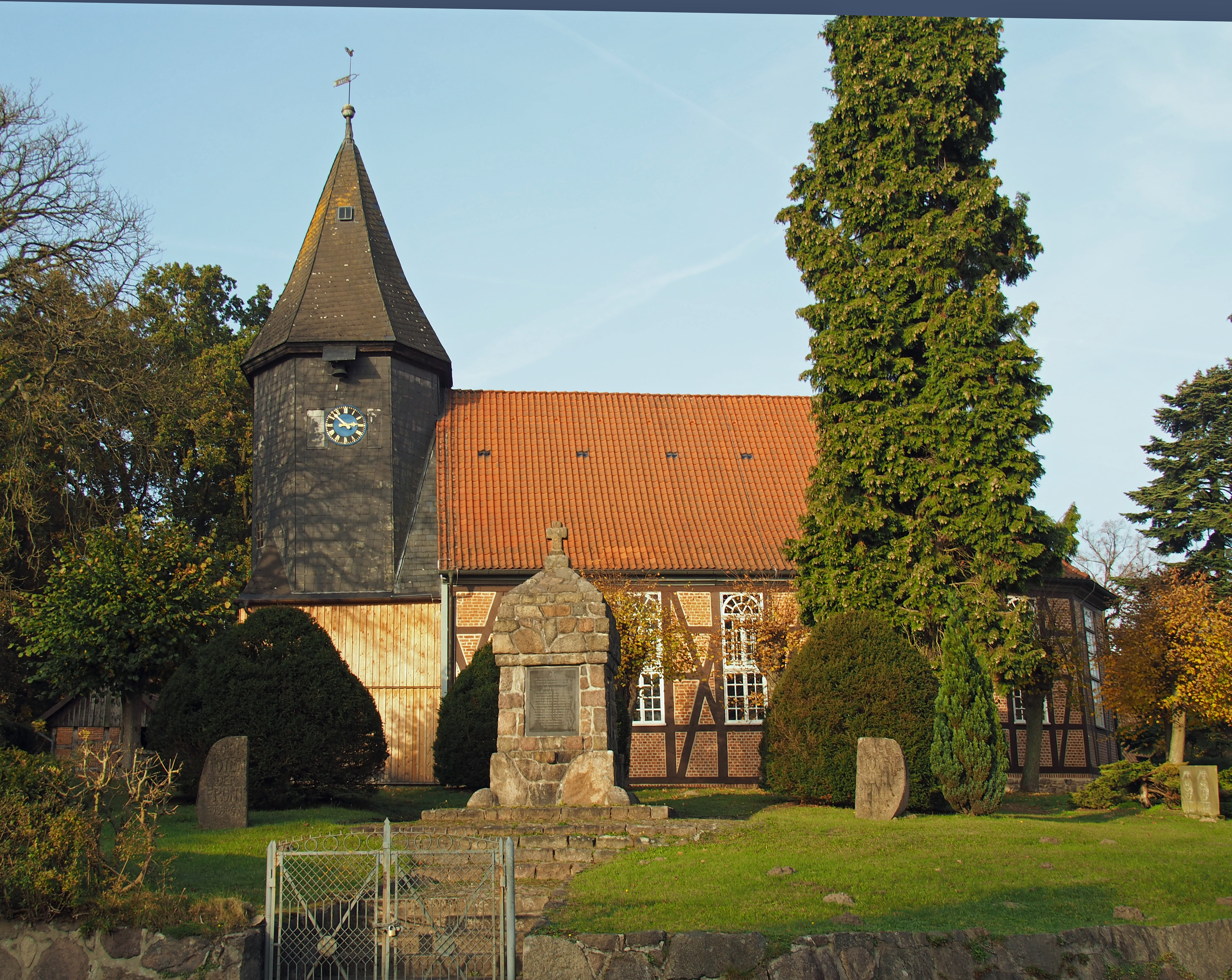 Kirche in Ostenholz im gemeindefreien Bezirk Osterheide im Landkreis Heidekreis